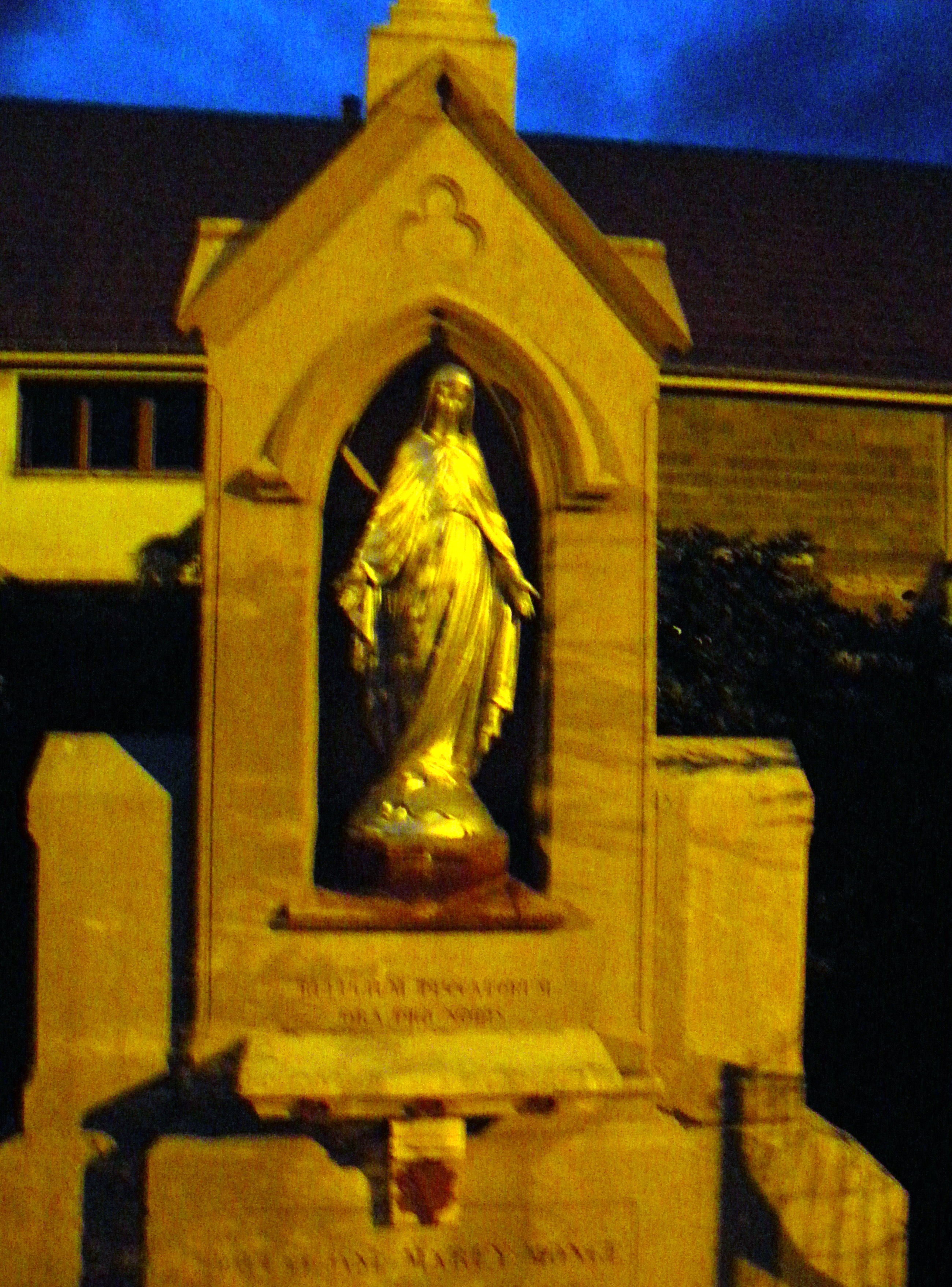 Statue de la Vierge à Saint-Bernard